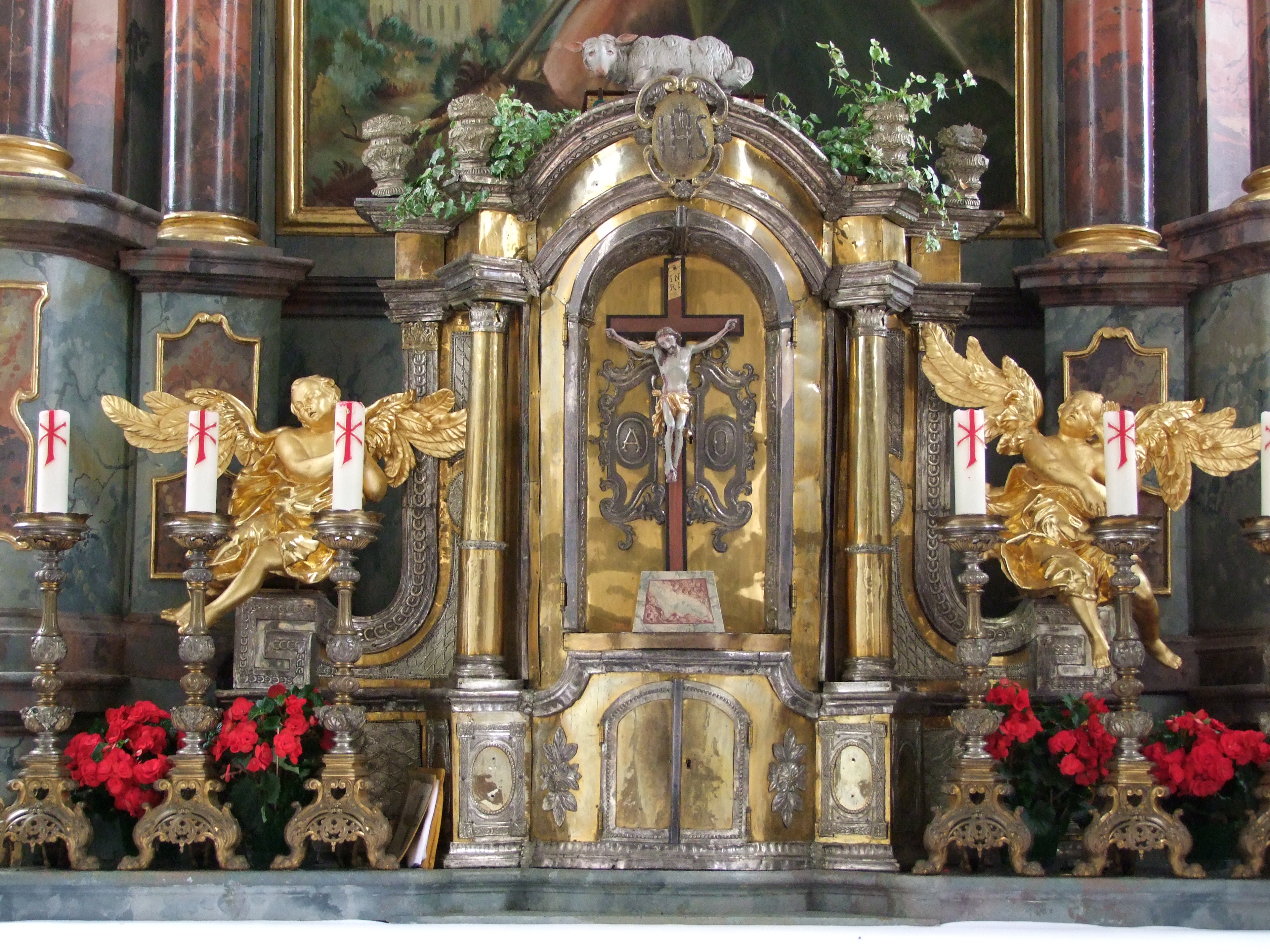 St. Jakobus der Ältere im oberschwäbischen Mindelau, einem Ortsteil der Stadt Mindelheim in Bayern/Schwaben